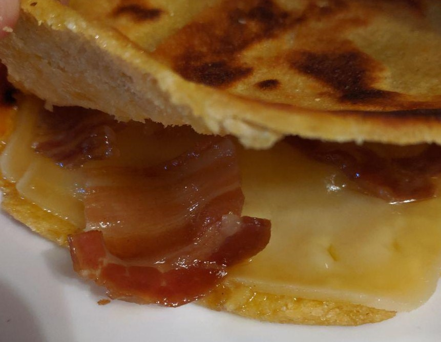 Taloa behi-gasna eta xingerrarekin. Erratzuko Zubi-punta tabernan egina.